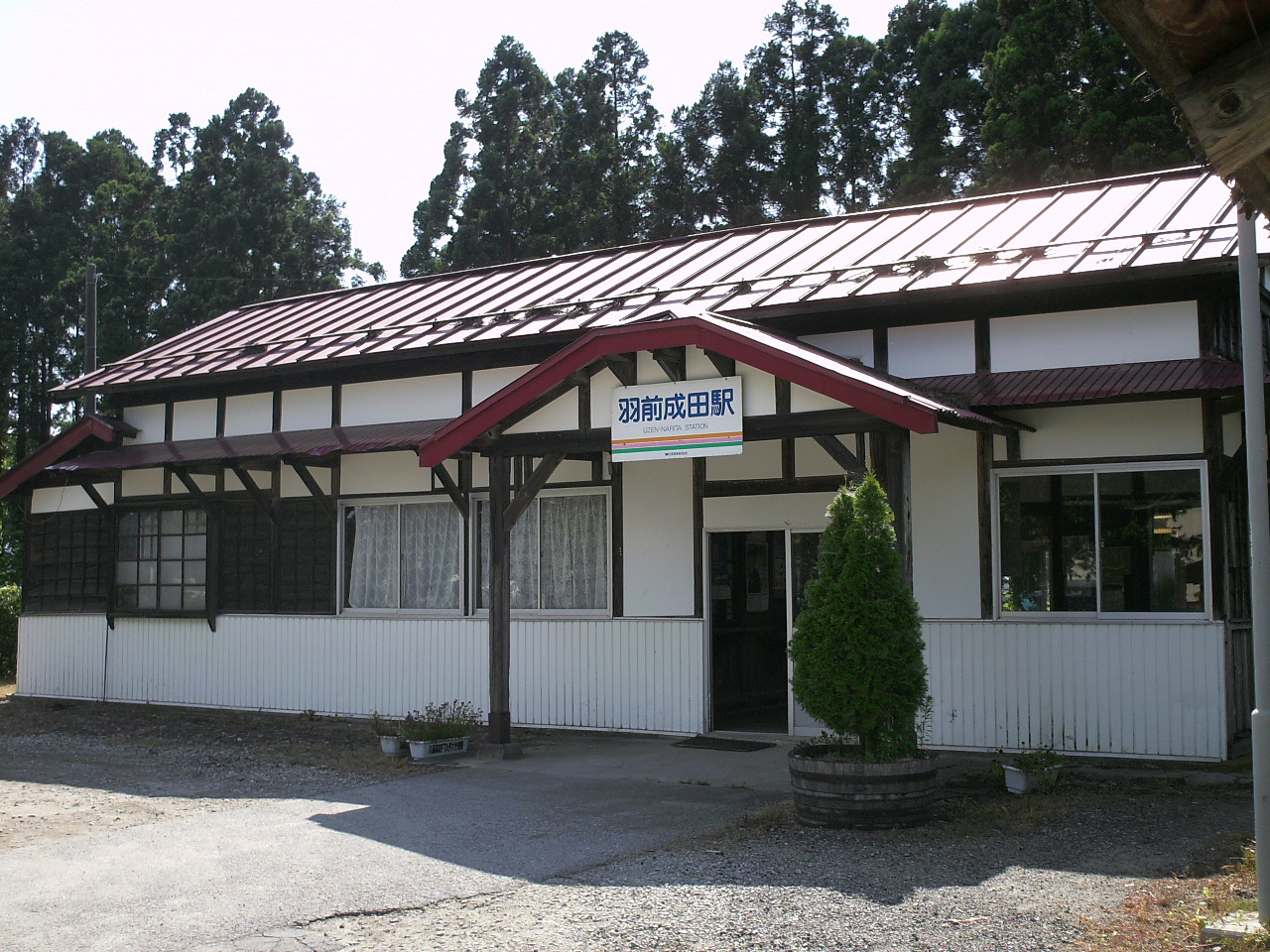 UzenNarita Station. 羽前成田駅